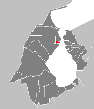 Municipality in Venezuela: Sanfrancisco-zulia.PNG